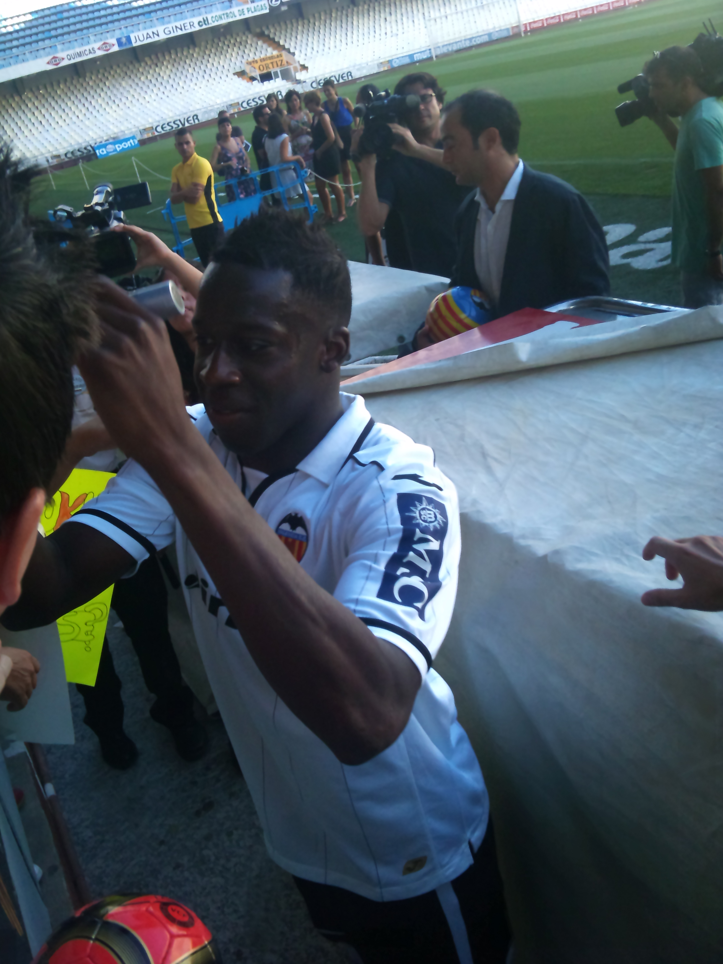 Imatges d'Aly Cissokho en la seua presentació com a jugador merengot